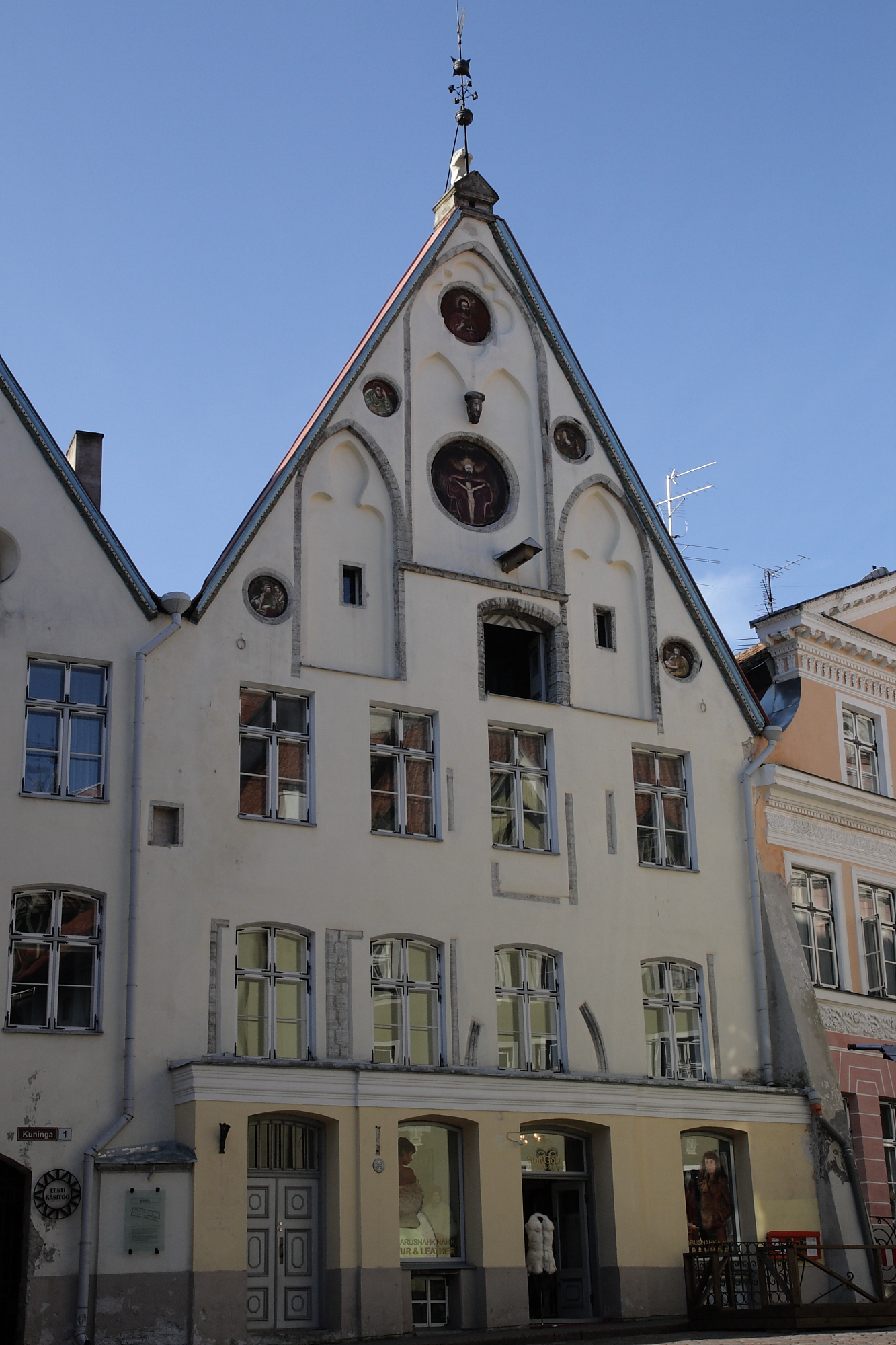 Tallinn, elamu Kuninga 1, 15., 19., 20. saj